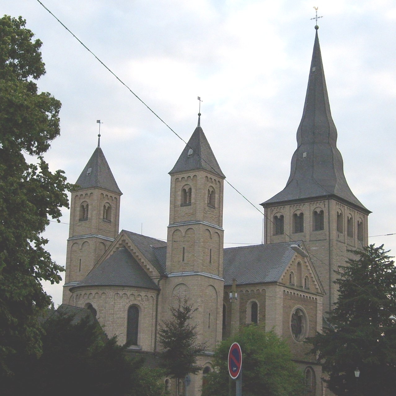 Kath. Kirche in Erkrath